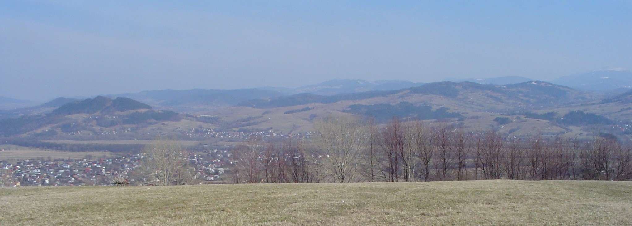 Author: user:Kokorik user:Kokorik Opis: Wieś Radziechowy i Wieprz widziane z Matyski